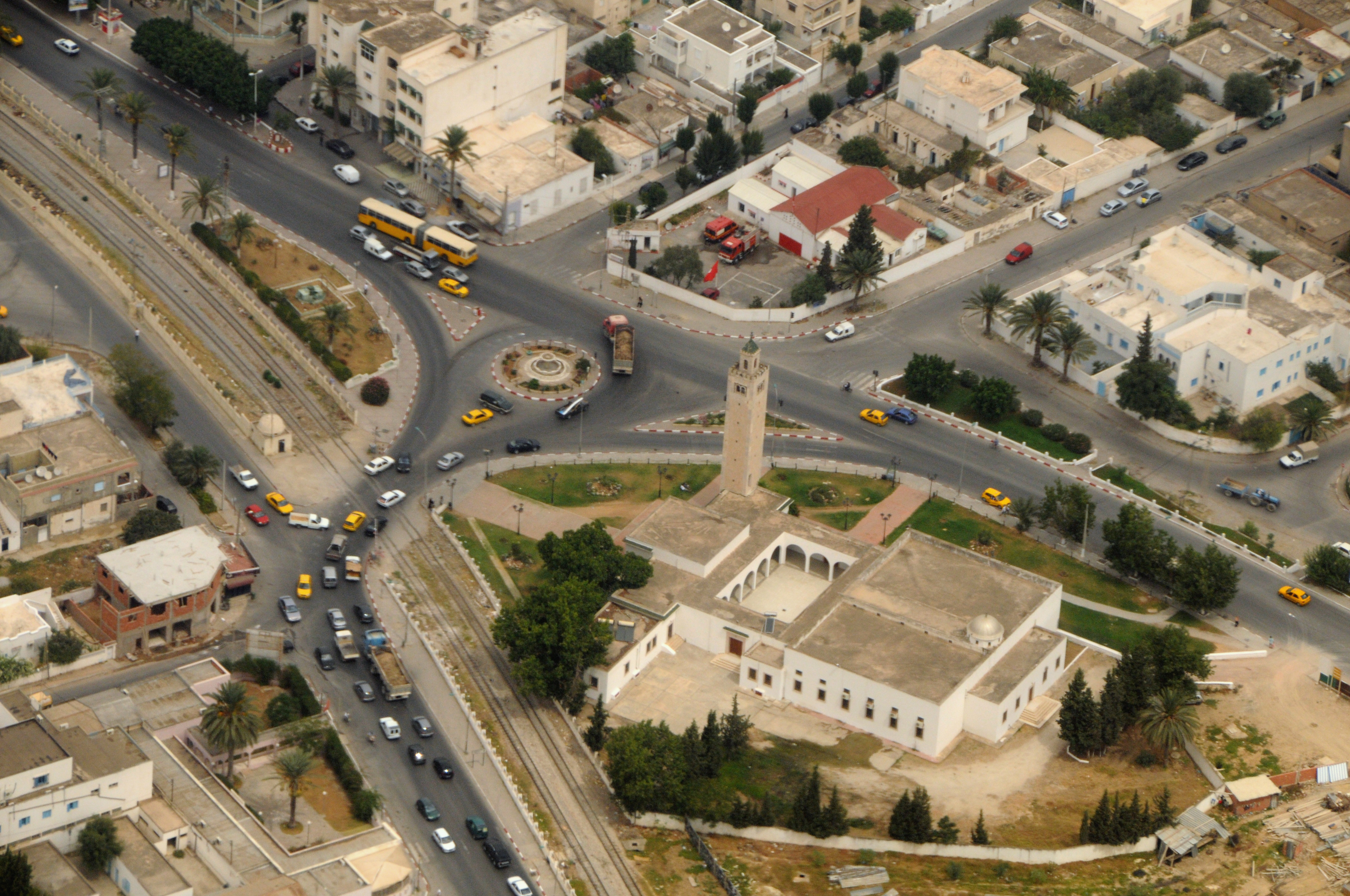 Vue aérienne de la grande mosquée de la ville de ben arous, banlieue sud de Tunis